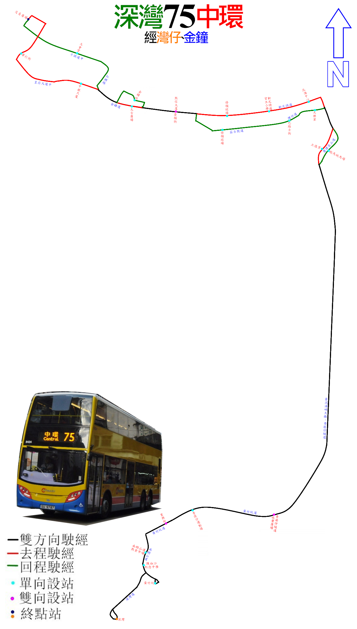 中文（香港）: 城巴75線的走線圖